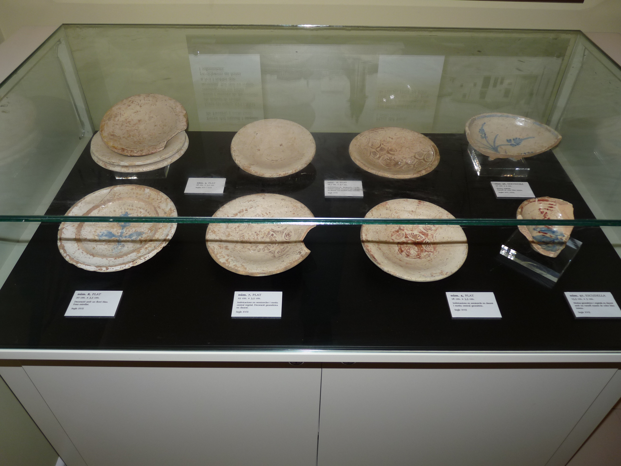 Restos arqueológicos de cerámica encontrada en Benetússer, y expuesta ahora en el museo de la localidad.